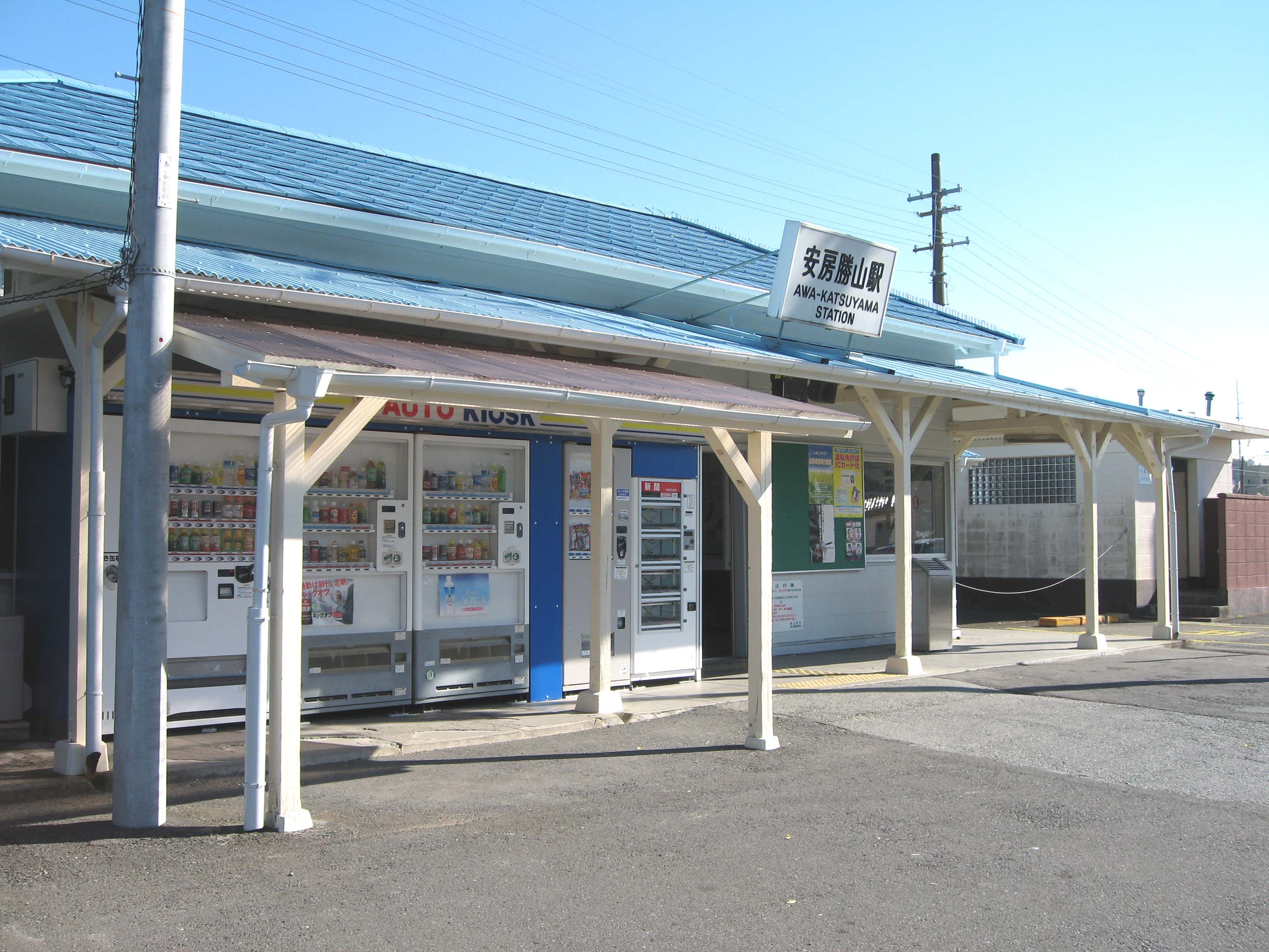 Awakatsuyama station, Uchibo Line, Chiba, Japan, 安房勝山駅・新駅舎